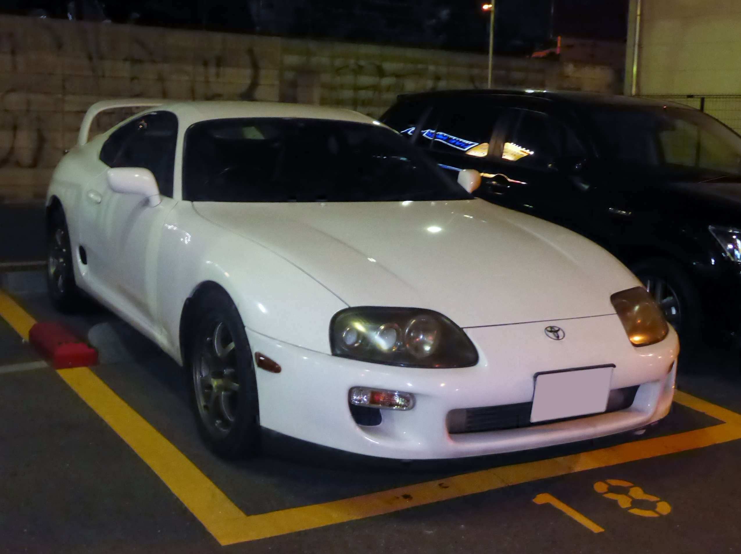 A80型トヨタ・スープラをフロントから撮影。